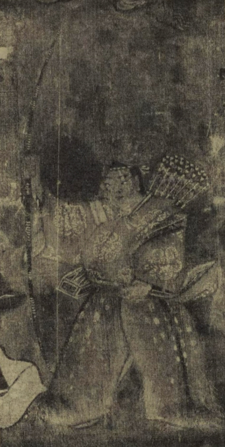 狩装束姿の諏訪大明神（三十番神中の垂迹神影）